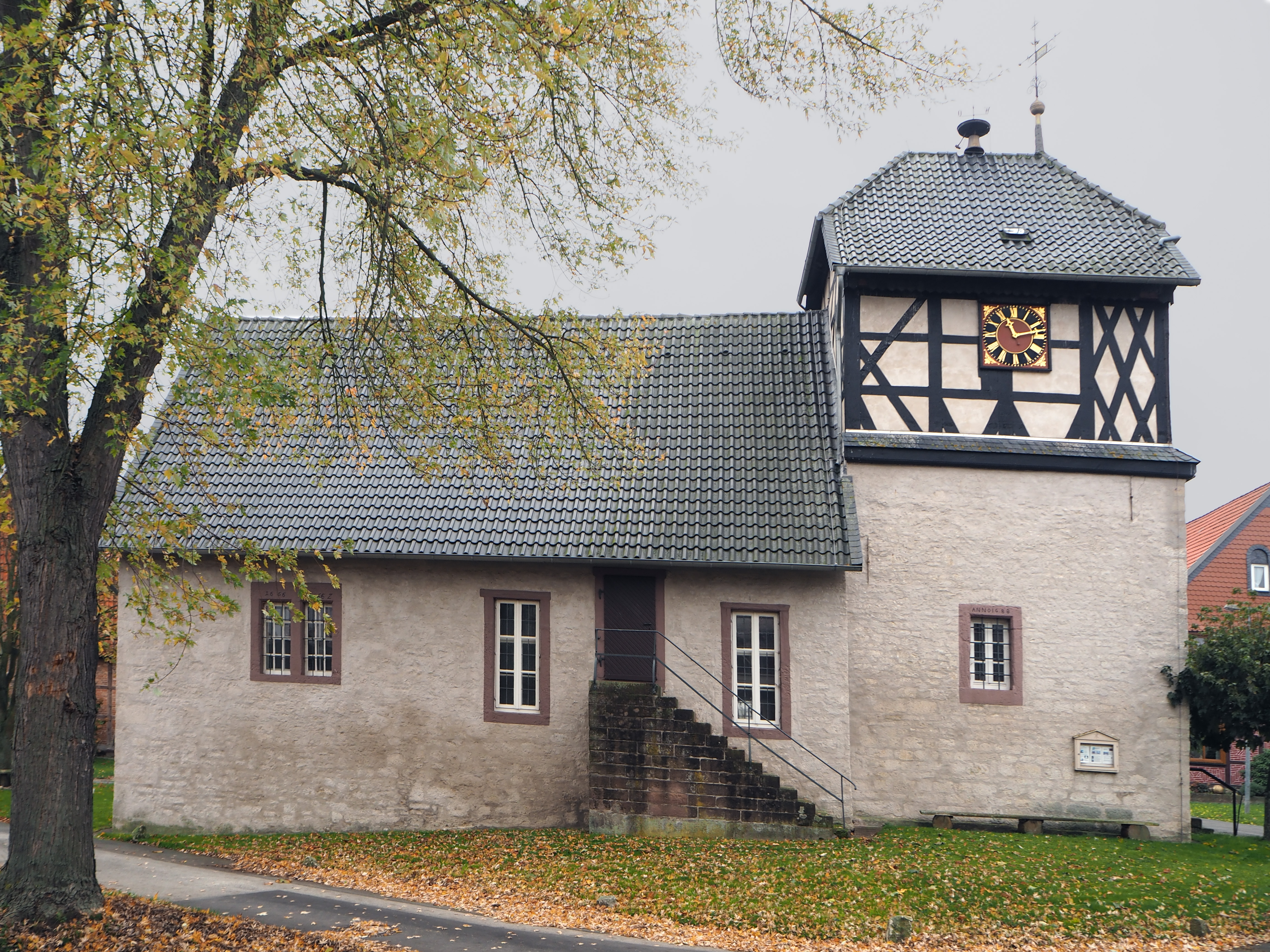 Wolperode – Dorfkirche – Foto 2019 - Die Dorfkirche wurde Anfang des 15. Jahrhundert von einem „Gerhard von Rauschenplat“ aus Bruchkalkstein erbaut. - Der Turm erreicht eine Gesamthöhe von 14,54 m. Sein massiver Unterbau trägt ein Obergeschoss in Fachwerkbauweise. Dort befinden sich die 400kg schwere Glocke und das Uhrwerk der Turmuhr. - Die Wetterfahne auf dem Turmdach trägt die Jahreszahl 1759. Das Turmfenster auf der Nordseite ist beschriftet mit der Jahreszahl 1688, ein Fenster an der Nordwand des Langhauses zeigt die Jahreszahl 1666. - Eine Außentreppe an der Nordseite führt zur Emporentür. Der flach gedeckte Kirchensaal ist 14,5 m lang und 8,6 m breit und weist eine zusammenhängende Empore auf.